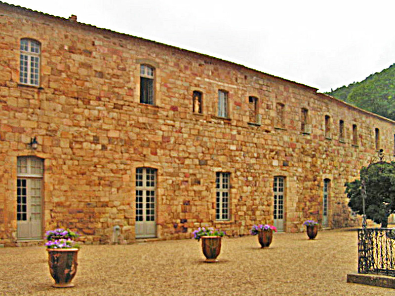 Abbay Fontfroide, Cour Louis XIV., Nordtrakt